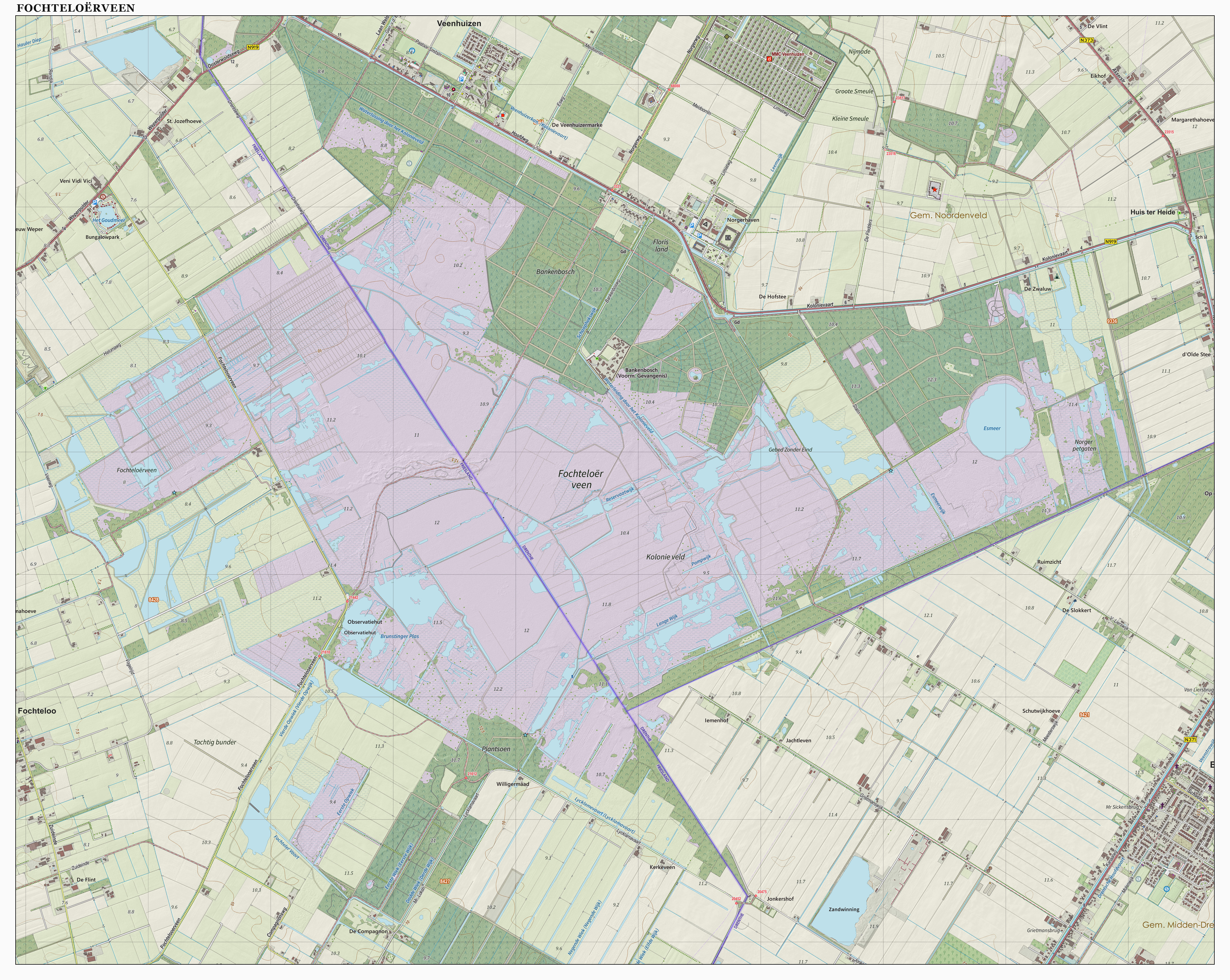 Topografische kaart van Fochteloërveen. Resolutie: 400 pixels/km. Samengesteld door Jan-Willem van Aalst op basis van de GML open geodata van de BRT/Top10NL (basisregistratie Topografie, Kadaster), vrijgegeven door Kadaster onder de Creative Commons BY licentie. Additionele gegevens uit BAG uit de Open Street Map en uit de Risicokaart. Zie ook de Legenda.